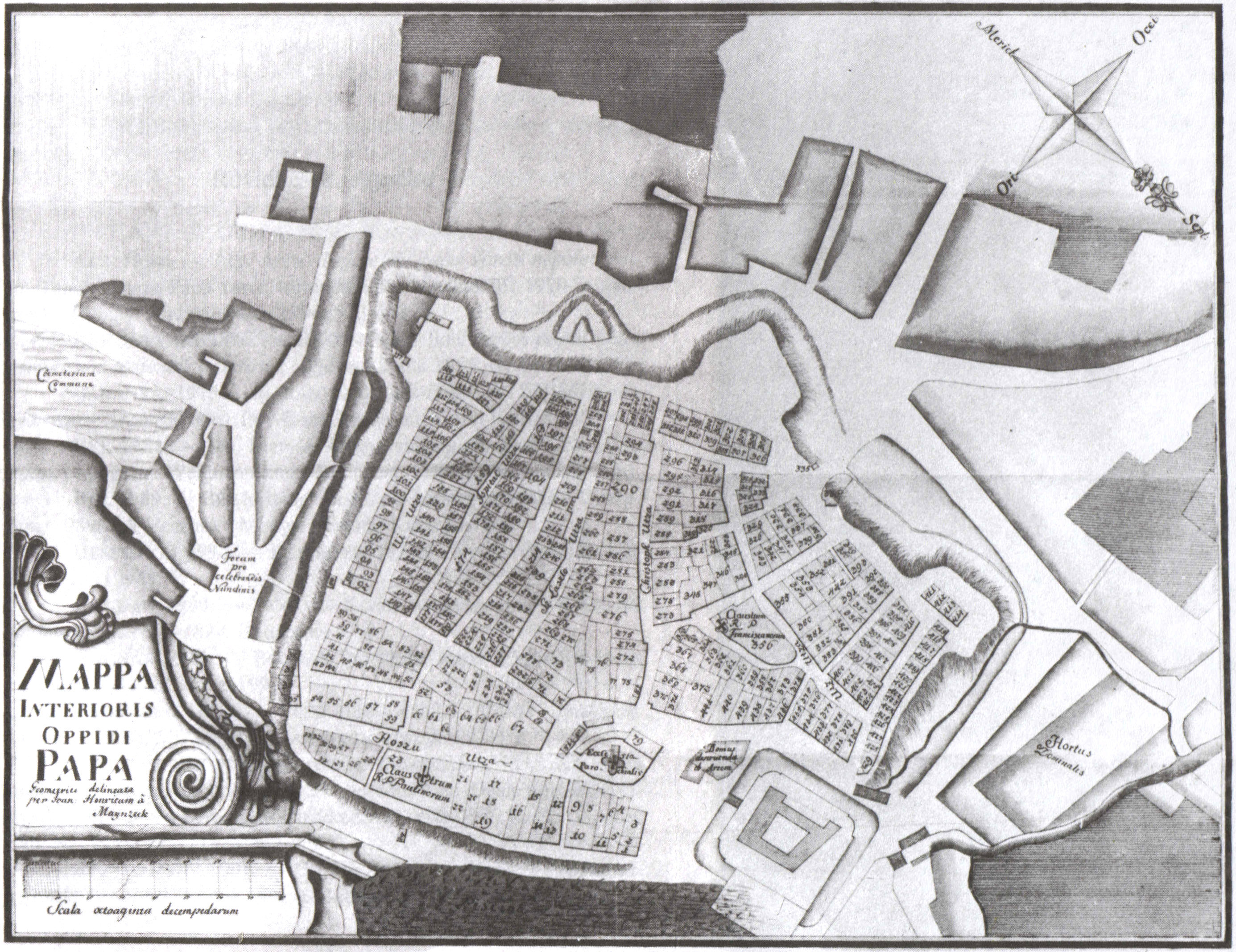 Map of the downtown of Pápa, Hungary by Johann Henrich Maynzeck from the 1730s. Maynzeck János Henrik térképe Pápa belsővárosáról az 1730-as évekből.